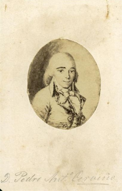 Ingeniero, topógrafo, editor y docente español que tuvo una amplia actuación en el Virreinato del Río de la Plata, defendió Buenos Aires durante las invasiones inglesas, apoyó la Revolución de Mayo, editó el Semanario de Agricultura y durante décadas fue profesor de artillería. Reproducción fotográfica de un retrato pictórico de época. Al dorso de la carte de visite se encuentra un texto original escrito en tinta negra con la siguiente leyenda: "Copia de la miniatura que el mismo Sor. D. Pedro Anto. Cerviño regaló a su Esposa Da. Bárbara Barquin y posee hoy el heredero de esta, D. Juan M. Estrada. Bs. Ayres. Julio 1866".